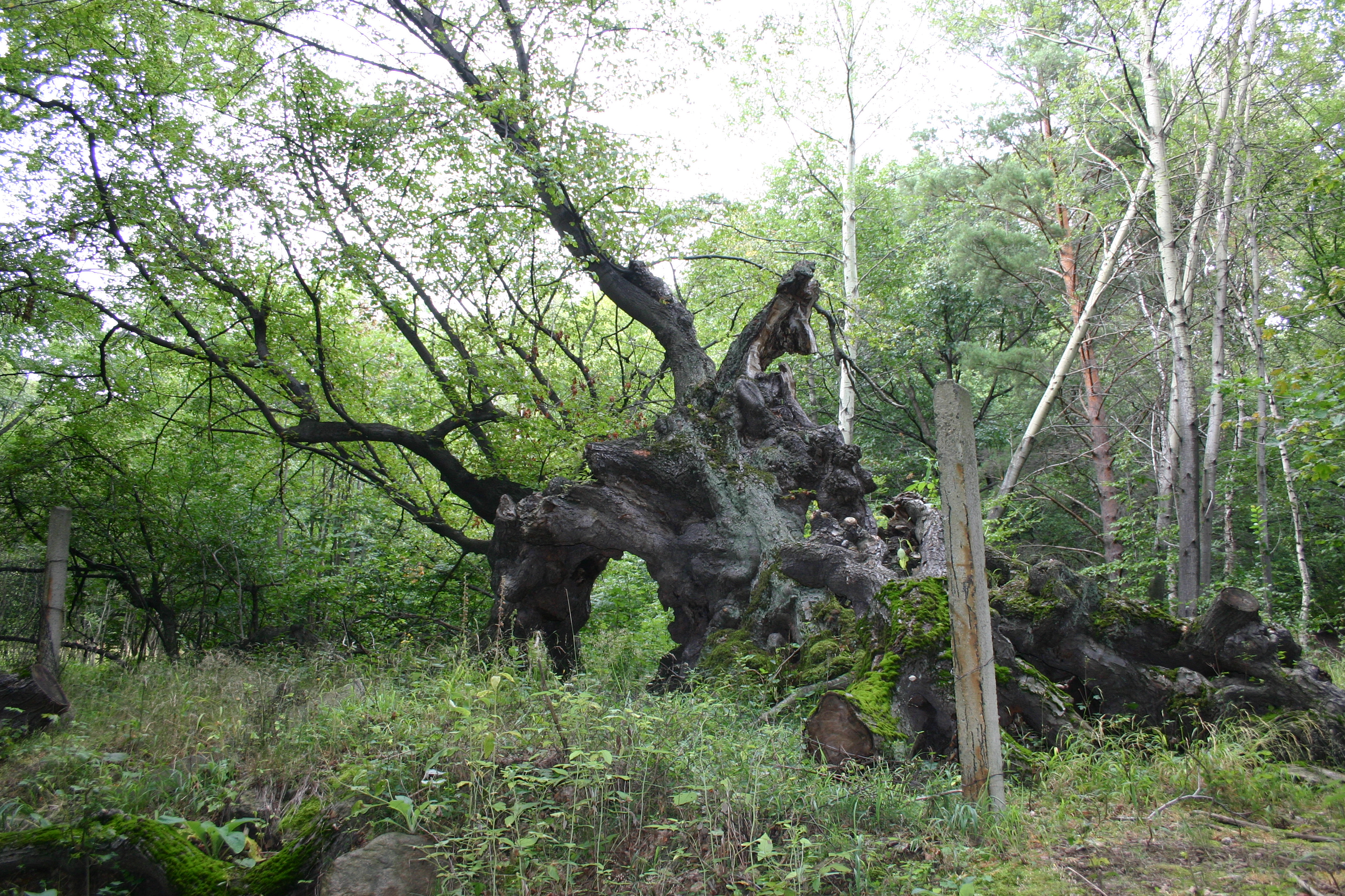 Žeberská lípa v okrese Most.